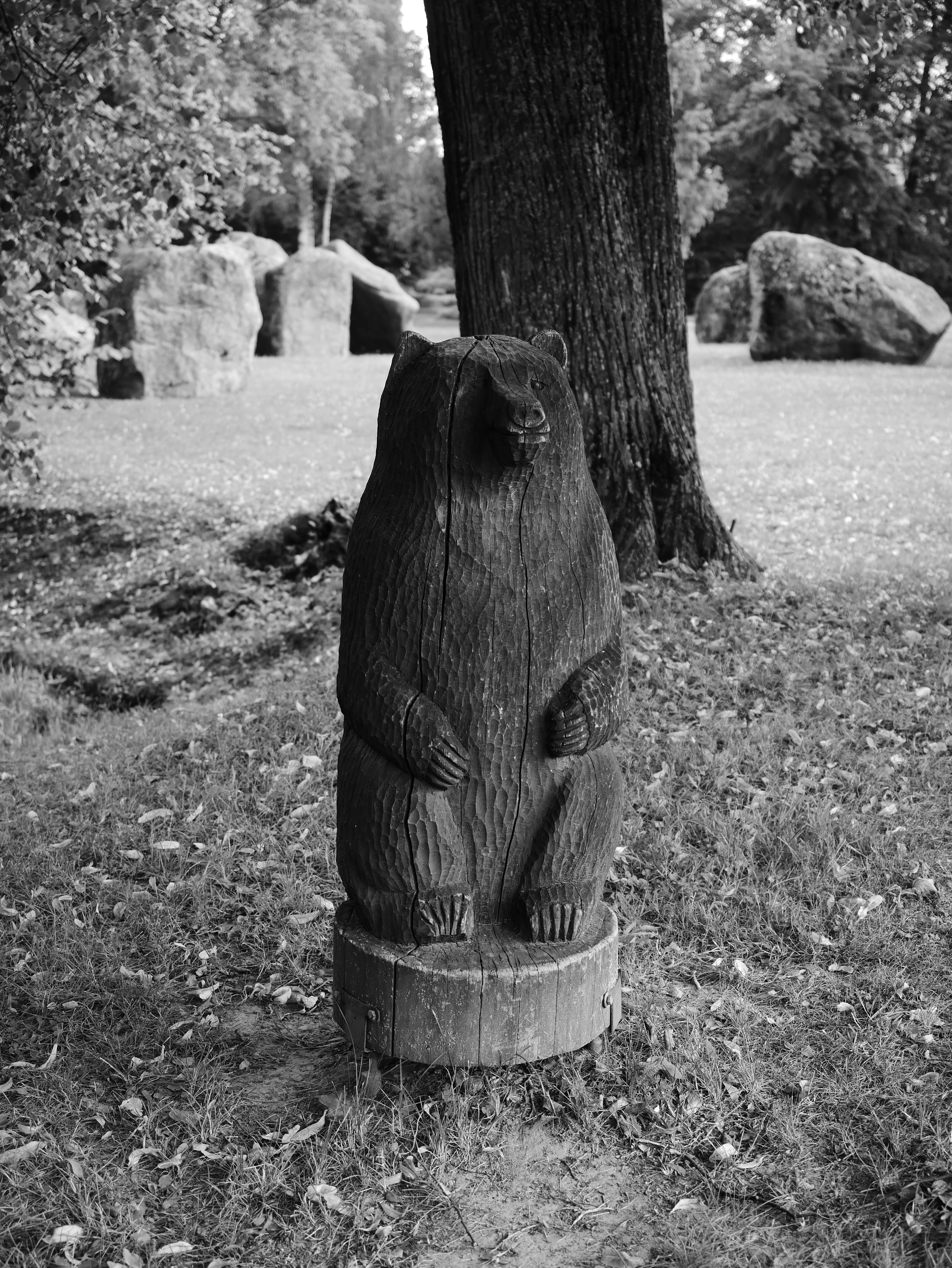 Karuskulptuur Balvi mõisa aias